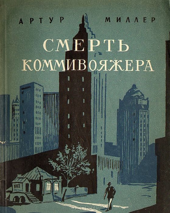 Արթուր Միլլեր Վաճառականի մահը